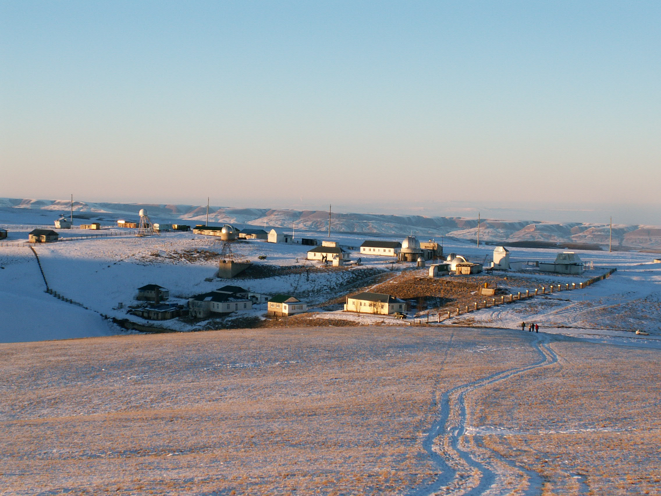 Общий вид на Кисловодскую горную астрономическую станцию, расположенную на горе Шаджатмаз, на Кавказе.